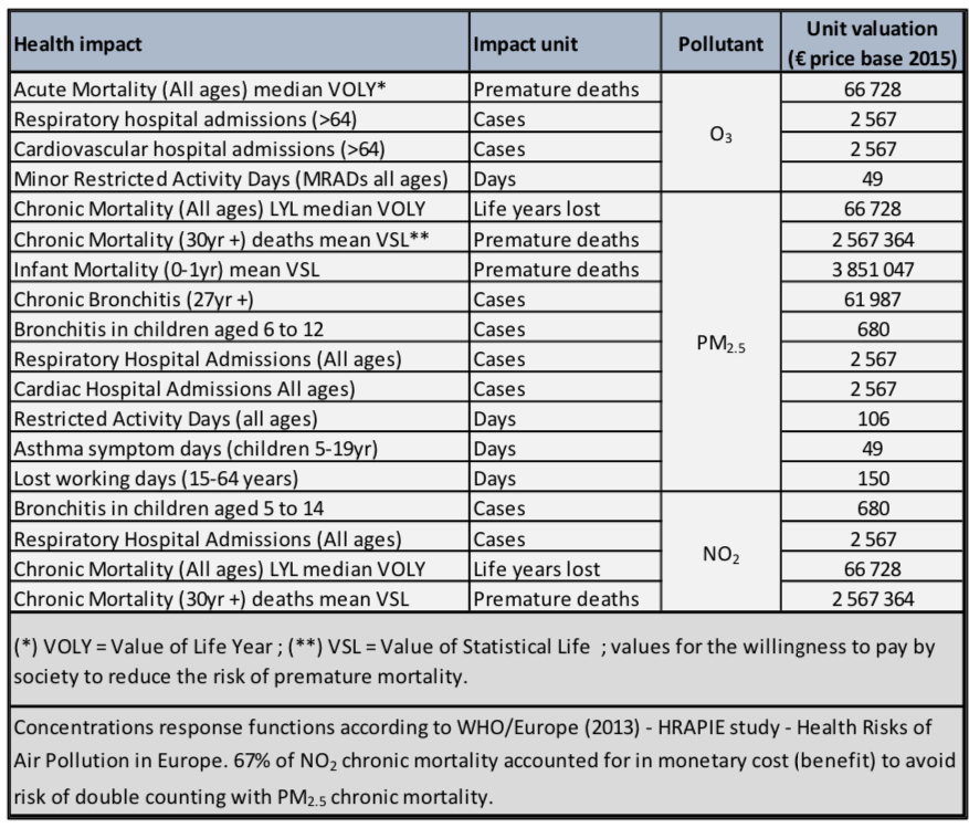 Extraite de l’étude ECAMED